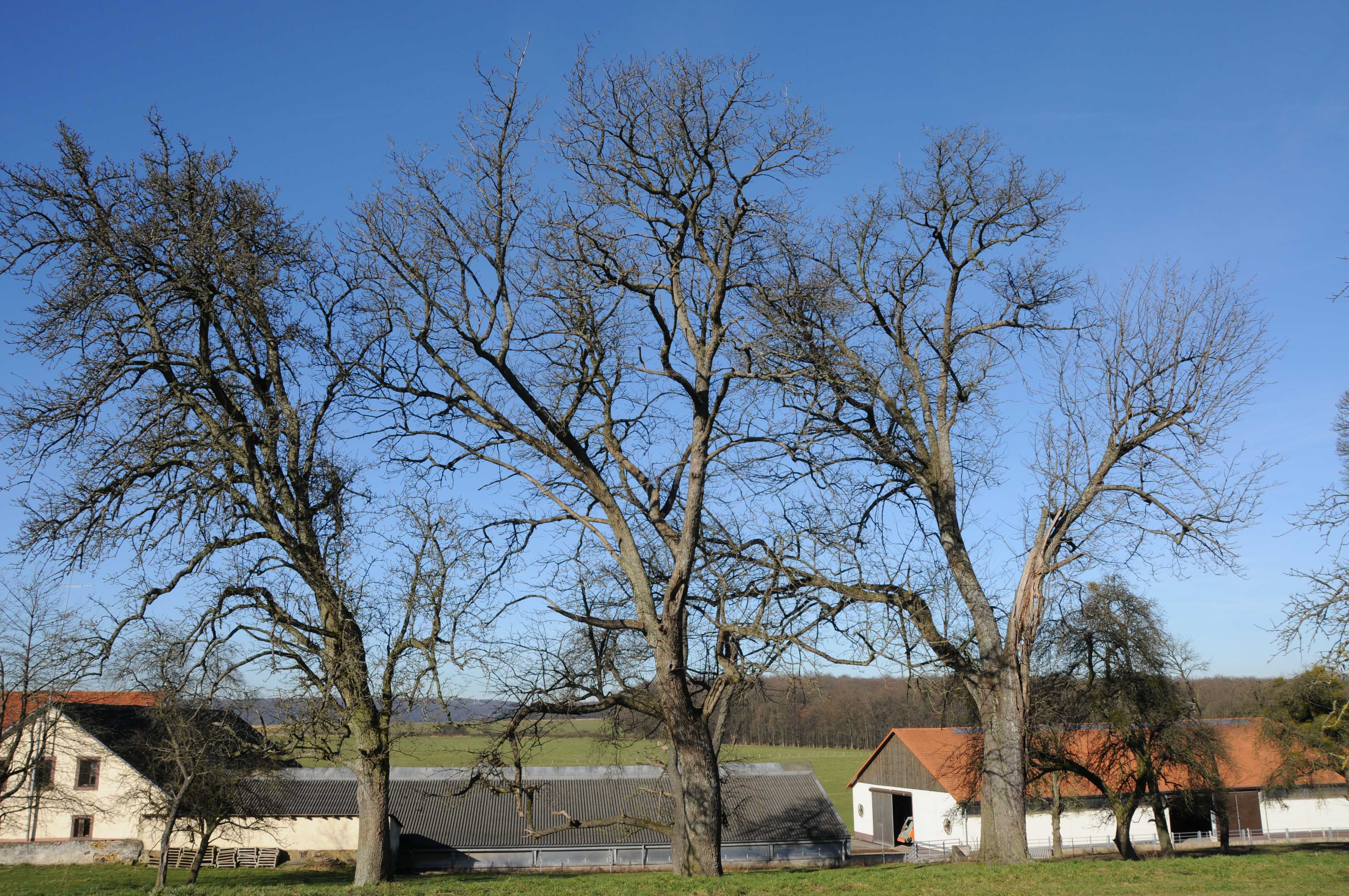 Les deux sorbiers domestiques remarquables (à droite) à la ferme de Pleitrange (Contern, Luxembourg)